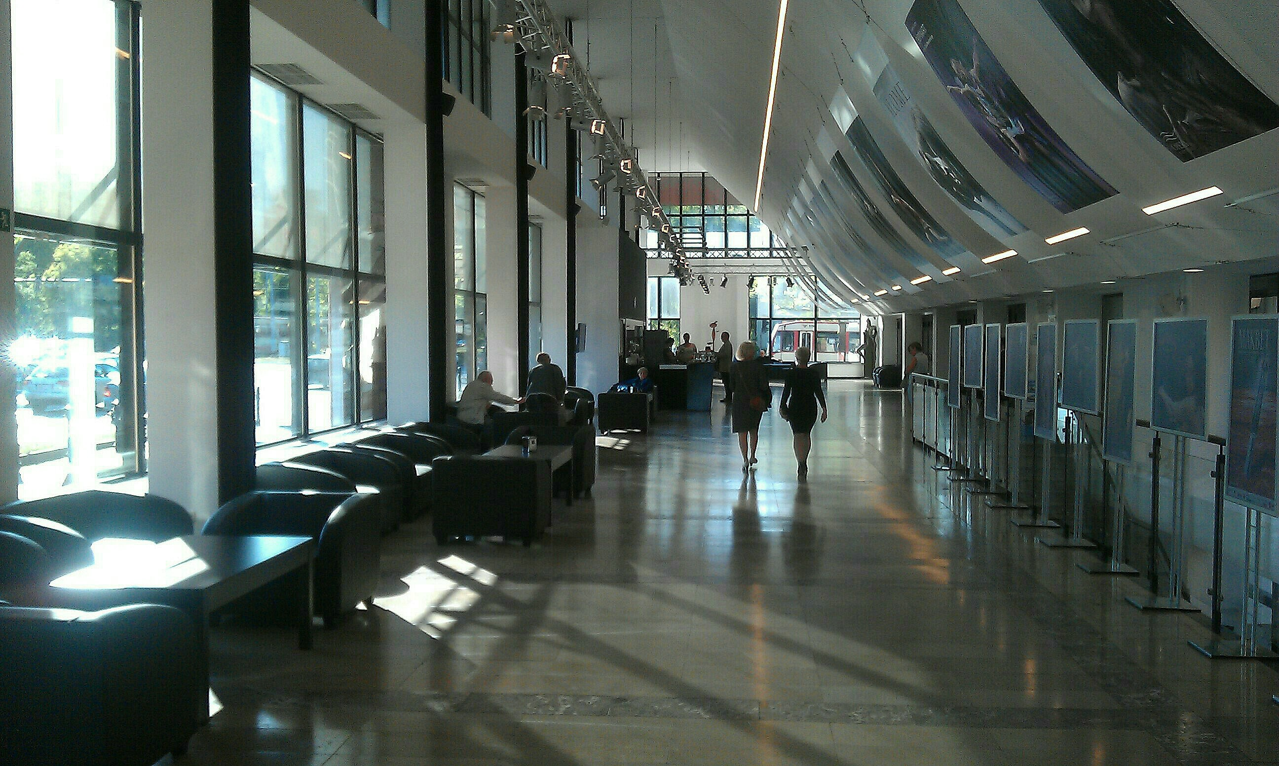 Danzig Baltische Staatsoper Innen.